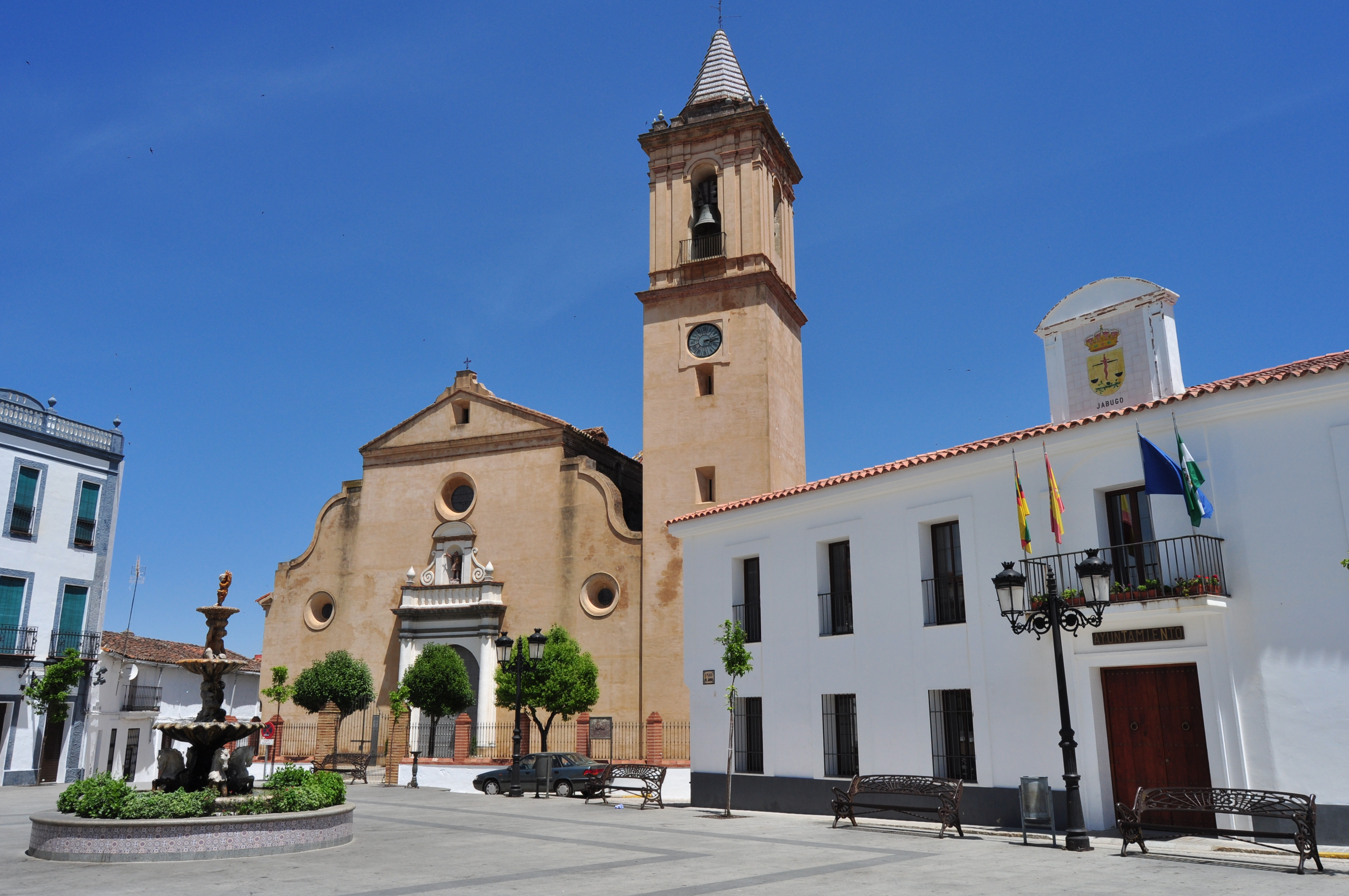 Jabugo - 003